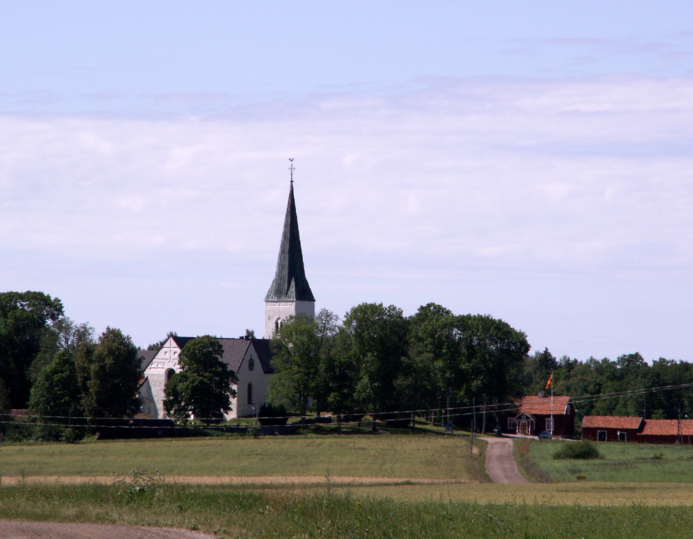 Fogdö kyrka från öster, juli 2006